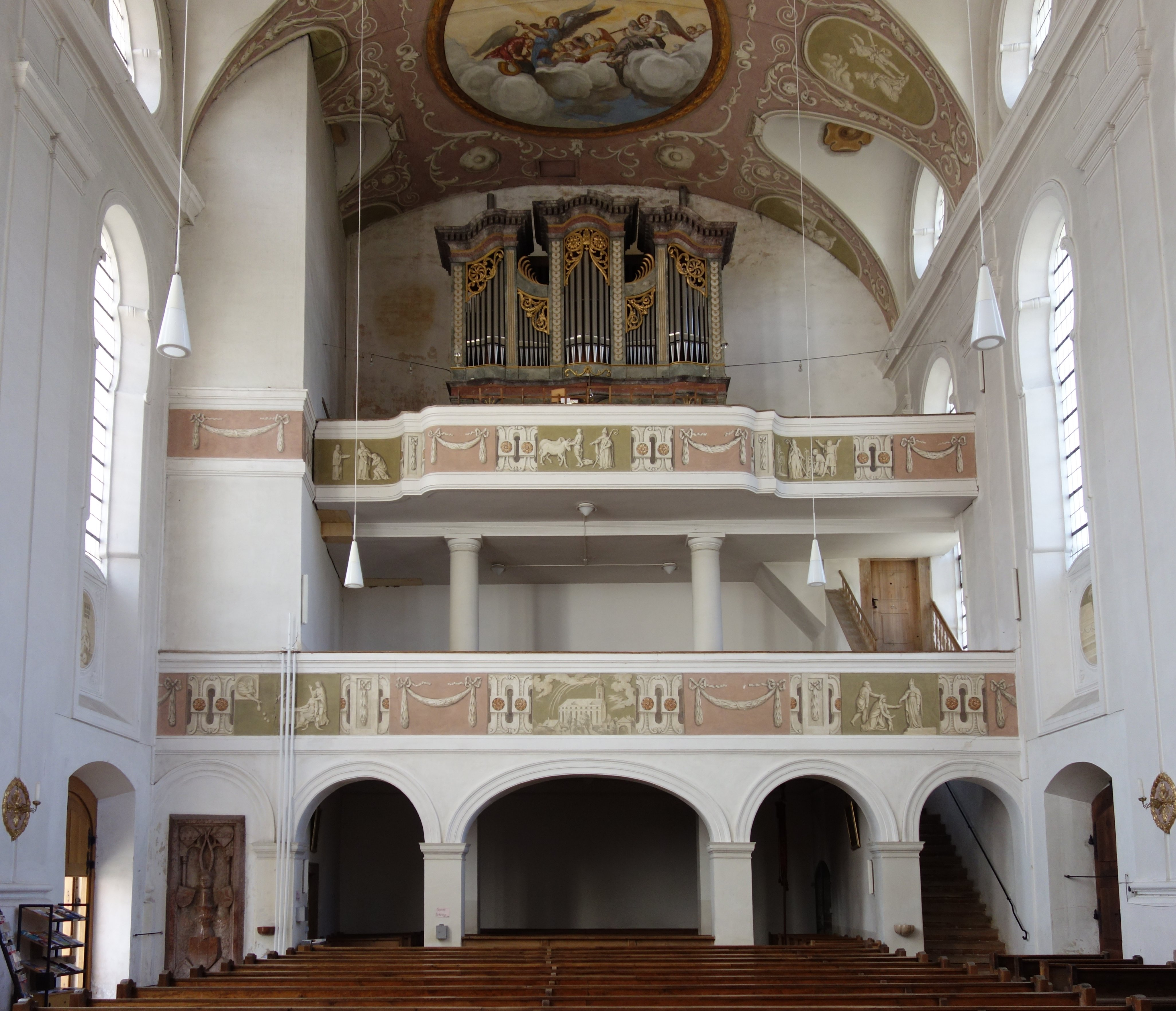 Orgel von St. Nikolaus in Altfraunhofen (1914, L. Nenninger, II/21; Prospekt von J. Schweinacher von 1799)